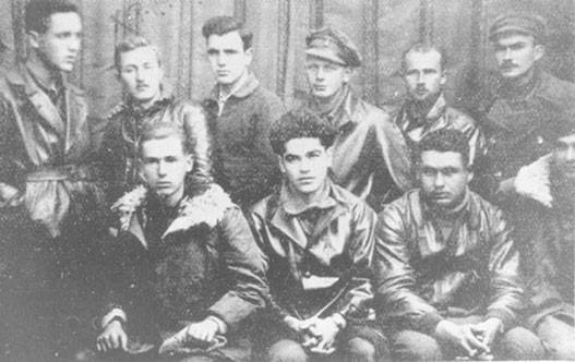 Srpskohrvatski / српскохрватски: Jugosloveni borci bataljona "Đuro Đaković" u okviru 129. internacionalne brigade. Stoje: Mirko Kovačević, Ratko Pavlović Ćićko, Lazar Udovički, nepoznat borac, Jože Breskvar, Ilija Engel. Sede: Slavko Čolić, Veljko Vlahović, Branko Krsmanović